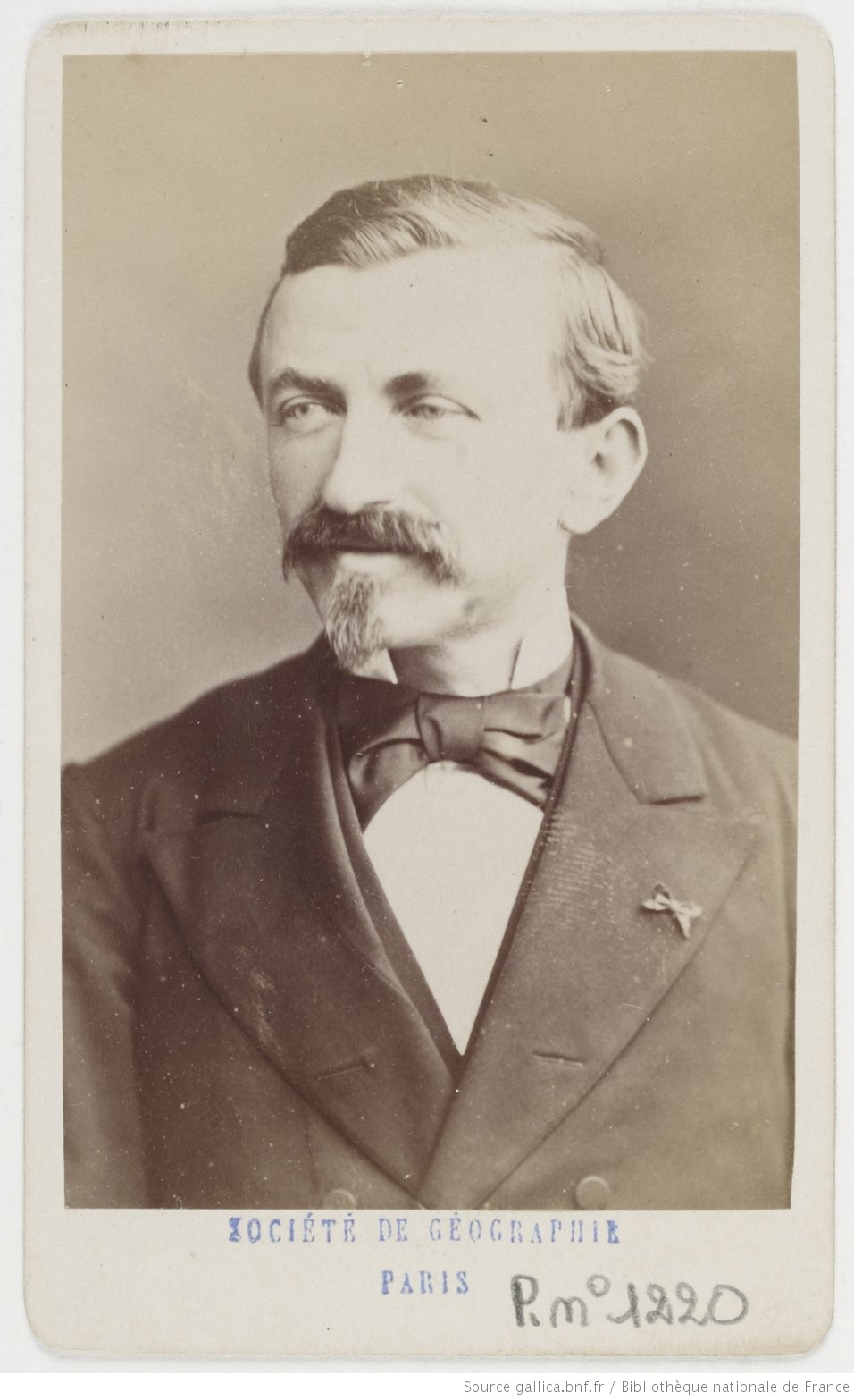 photo d'identité